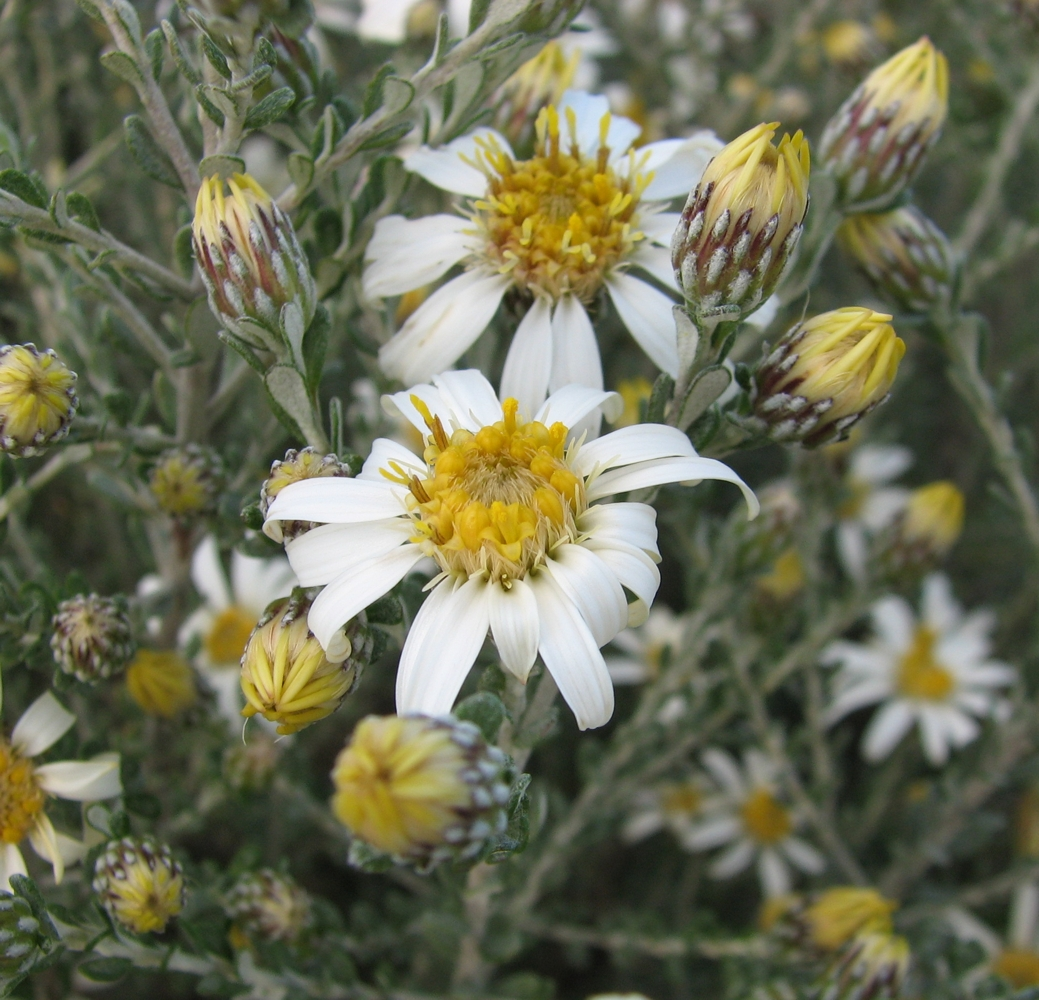 Oleraia pimeleoides, Royal Botanic Gardens Cranbourne, Victoria, Australia